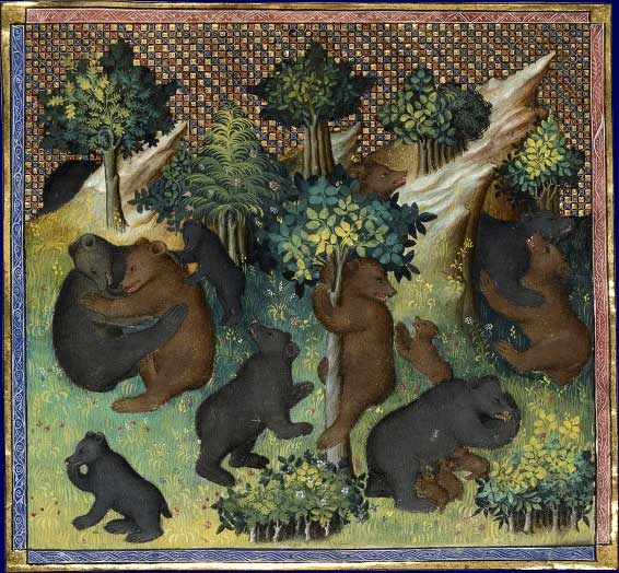 De l'ours et de toute sa nature, Gaston Phébus, Livre de chasse, France, début du XVe siècle. Conservé à Paris, BNF, département des Manuscrits, Français 616, fol. 27v.